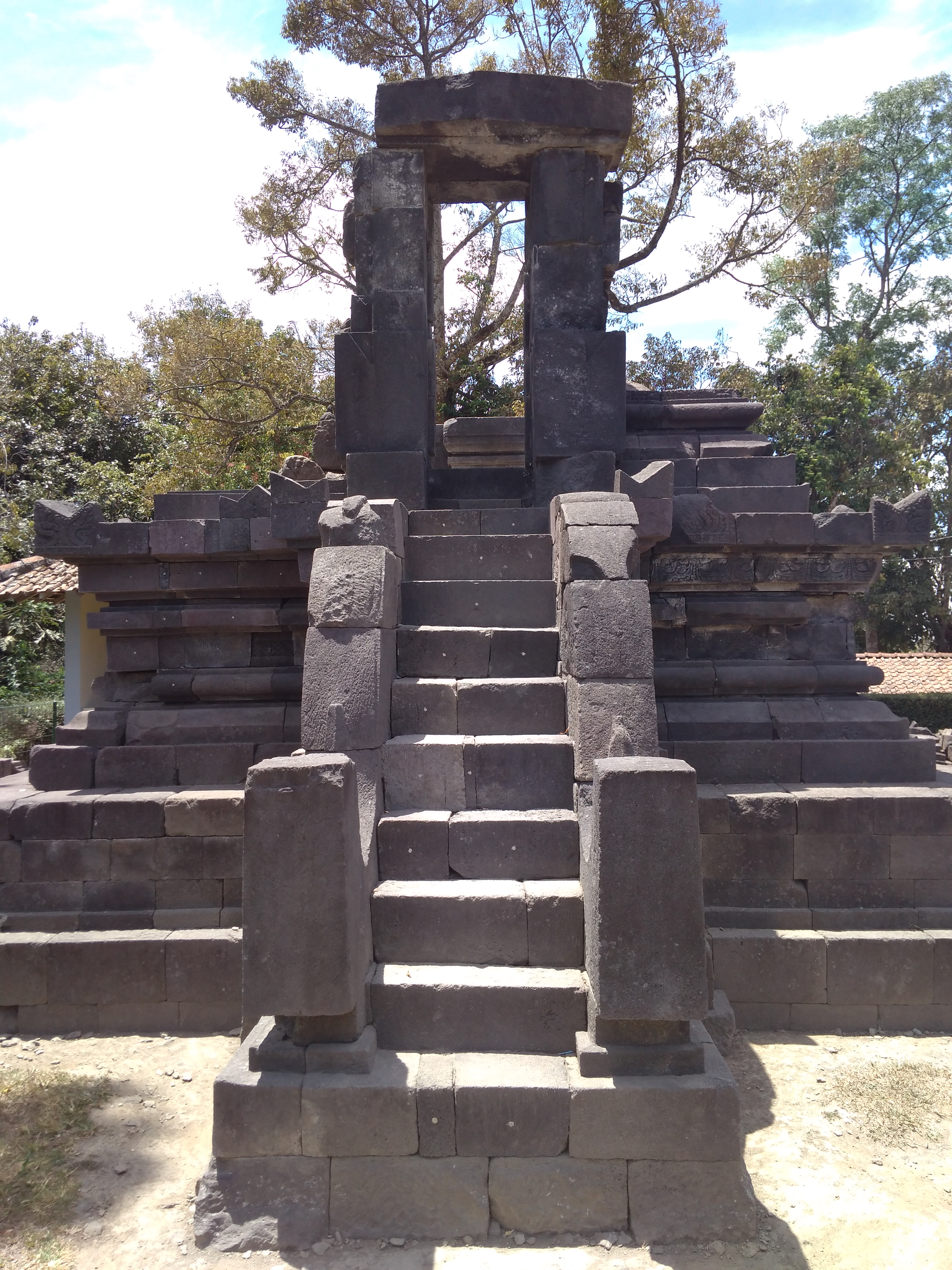 Candi induk di kompleks Candi Lawang